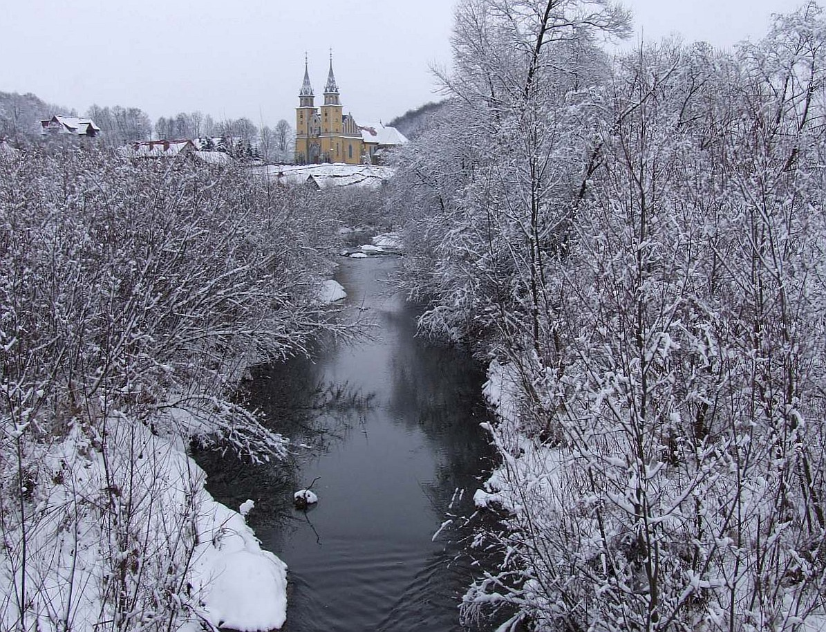 Widok na kościół w Trzcianie od południowej strony